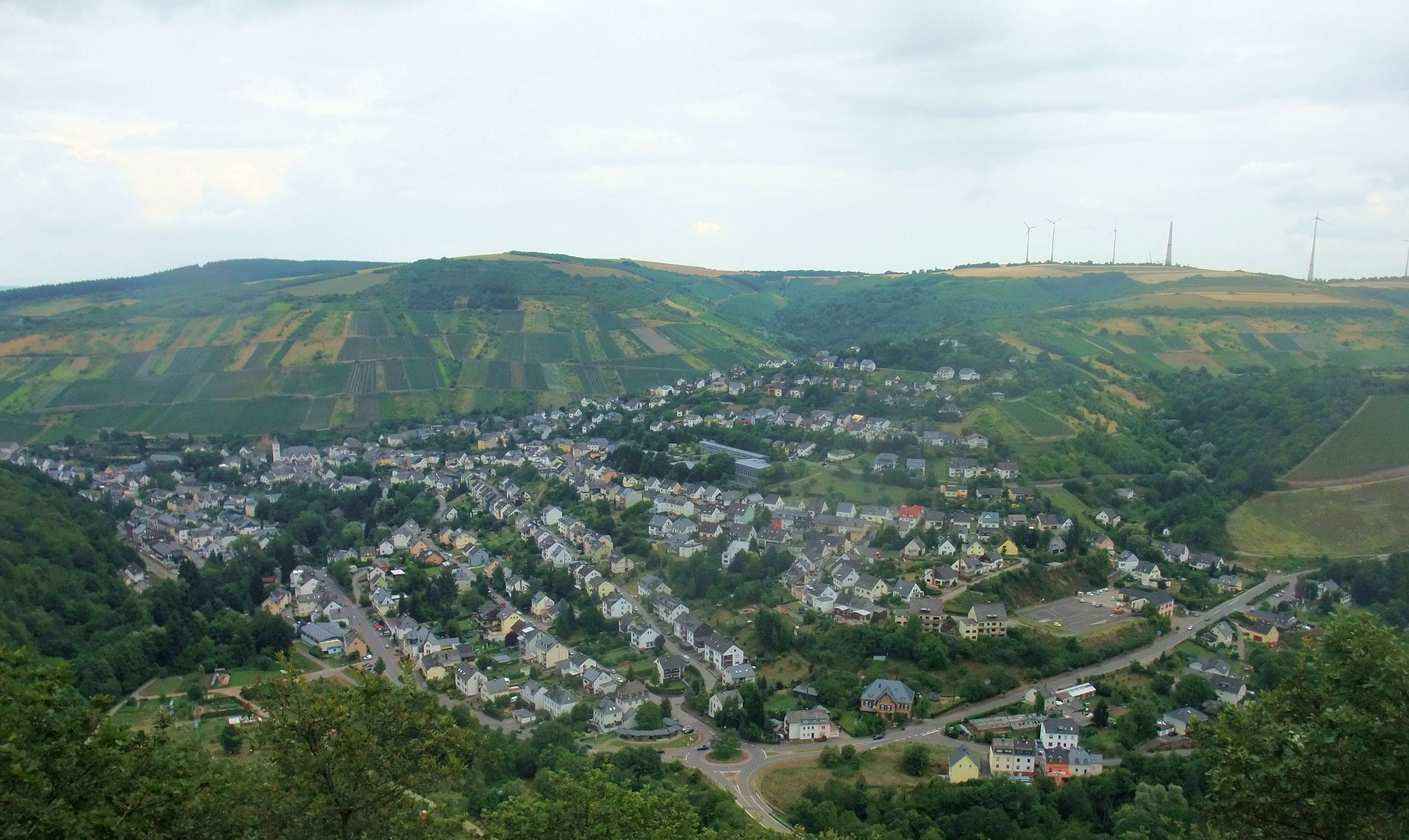 Waldrach